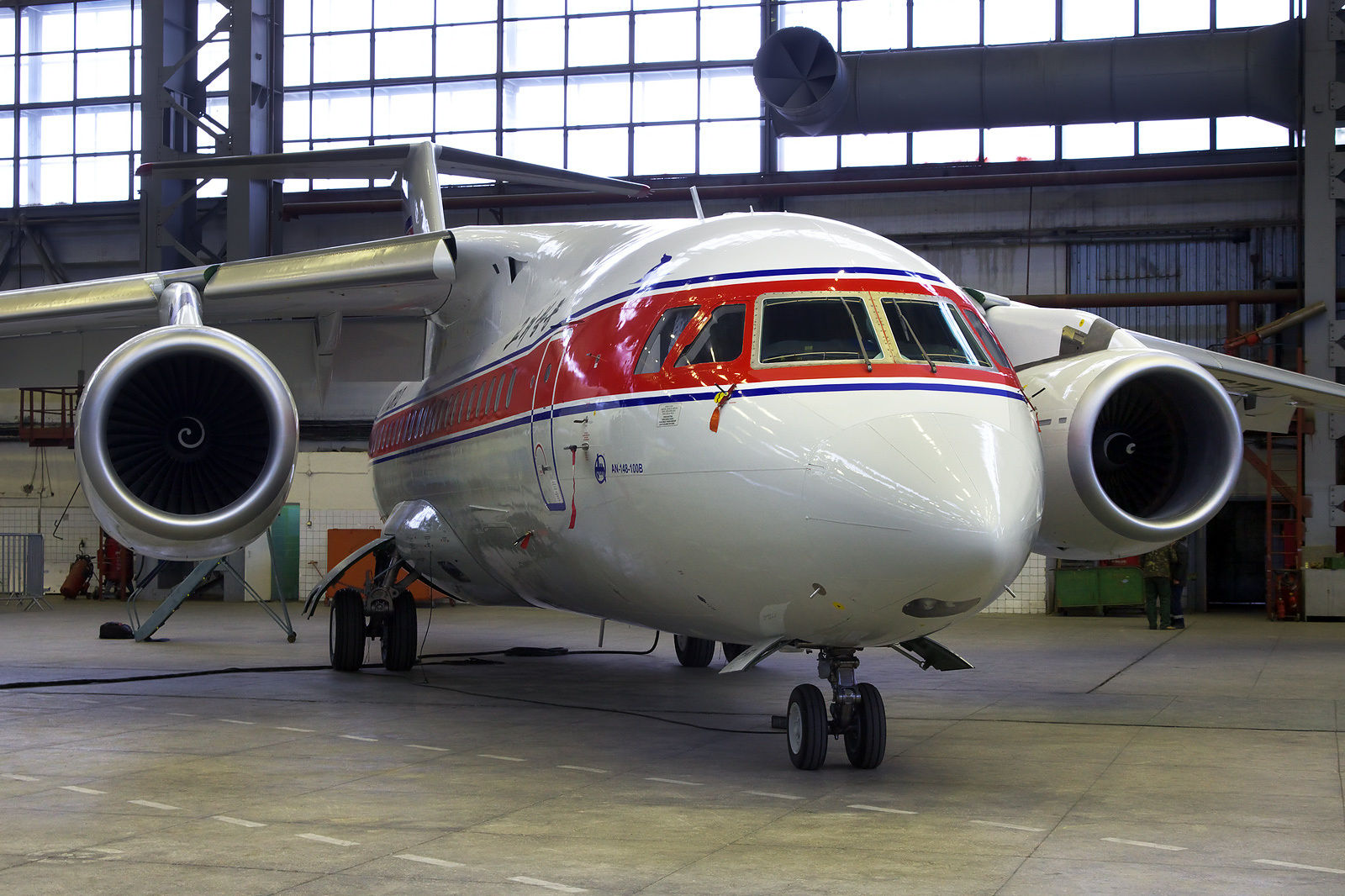 Air Koryo Antonov An-148-100B